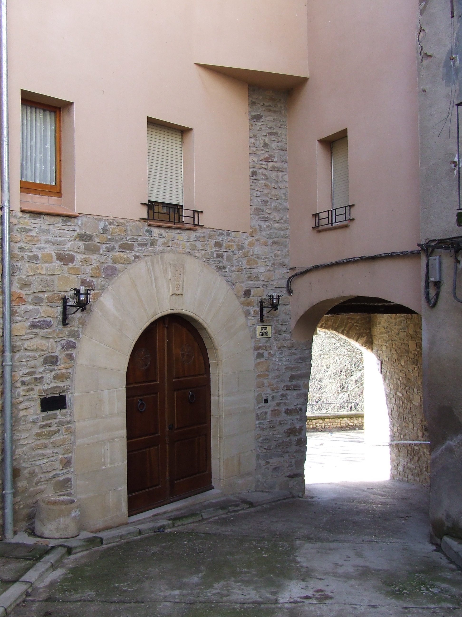 Porta sud del clos de la vila, a l'extrem del carrer Major i portal de Casa Artal (Palau de Noguera, Tremp, Pallars Jussà